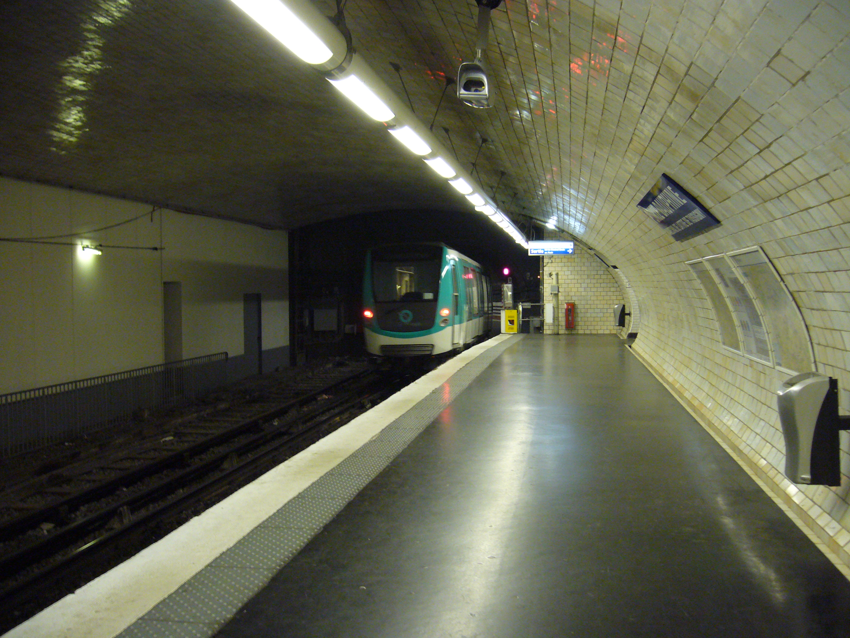 Une rame MF 2000 entre dans la boucle de la station Porte Dauphine sur la ligne 2 du métro de Paris.